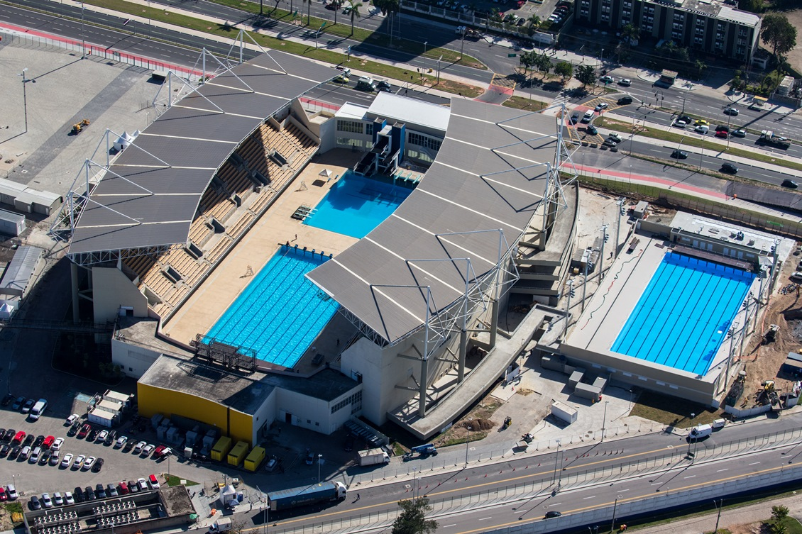 Centro Olímpico de Deodoro